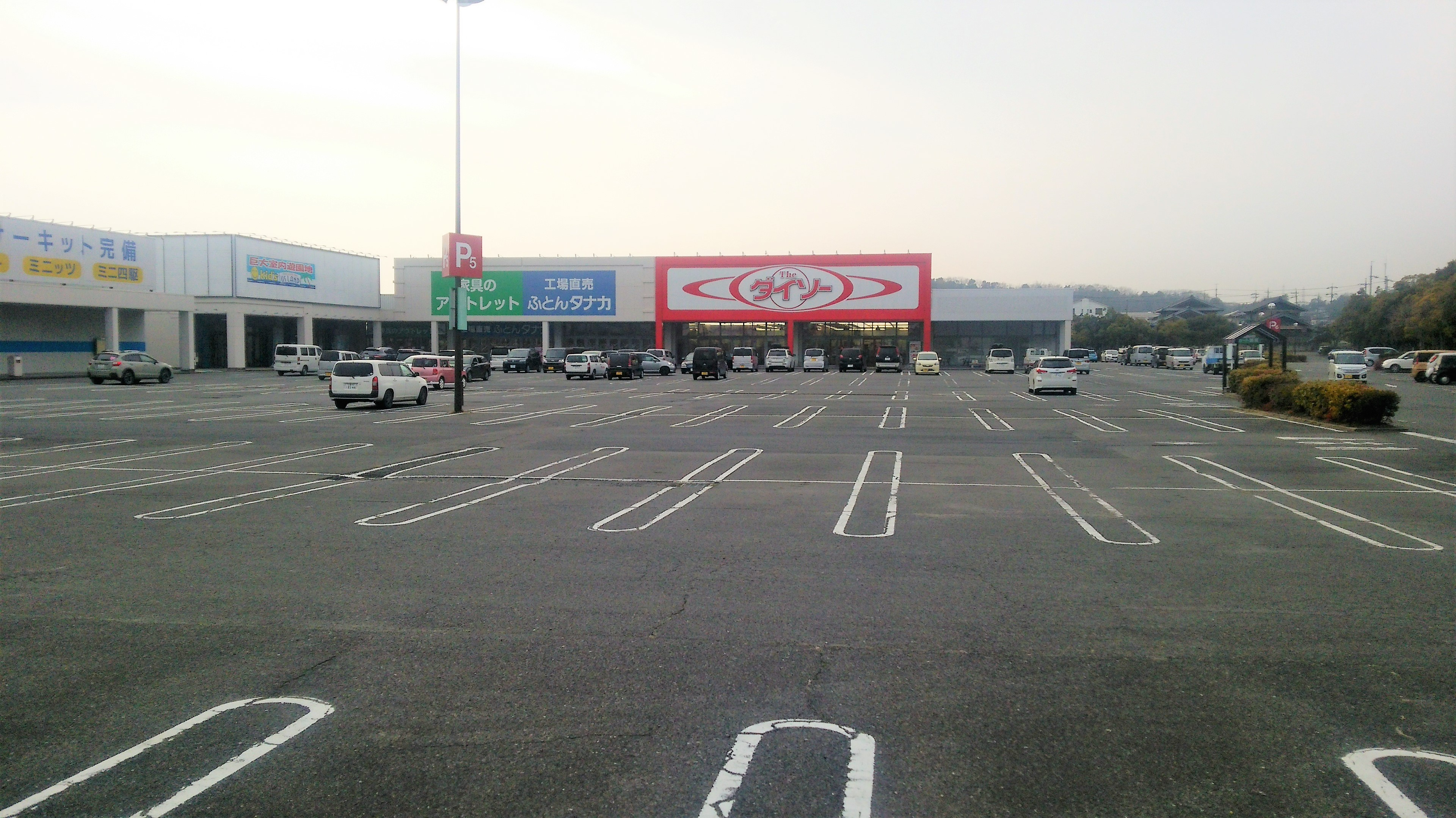 イオンタウン四日市泊西南側敷地 (レタッチ済み)